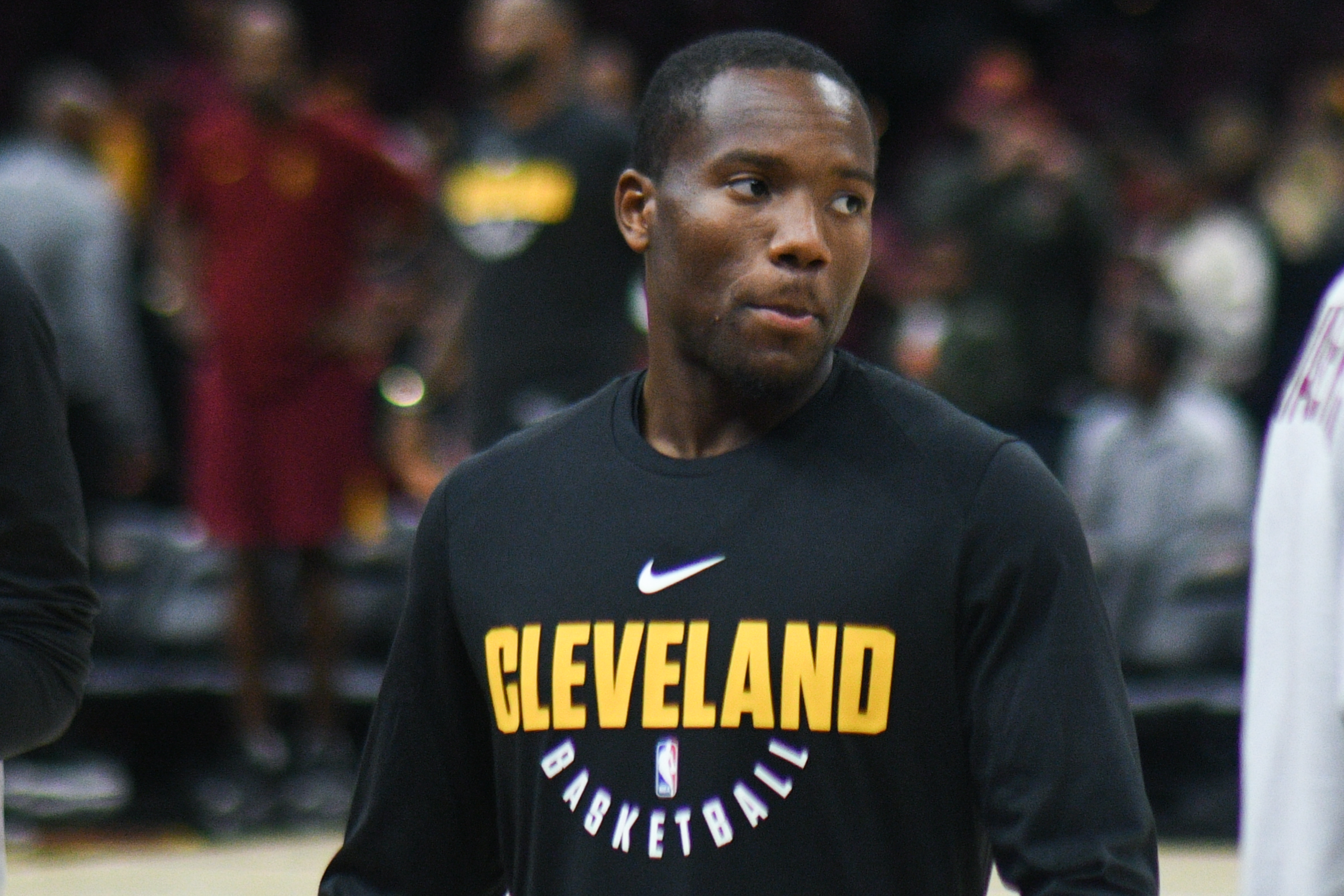 Kay Felder